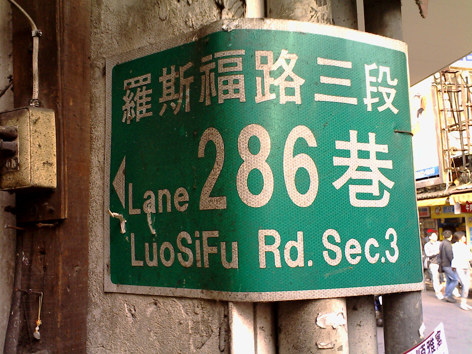 臺北市中正區羅斯福路三段268巷巷標。